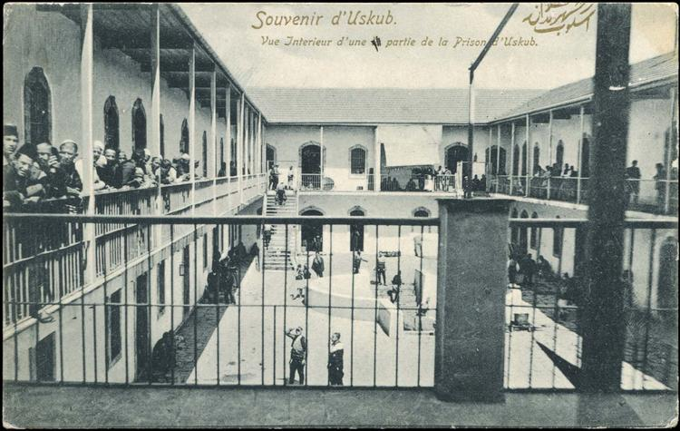 Скопският вилаетски затвор